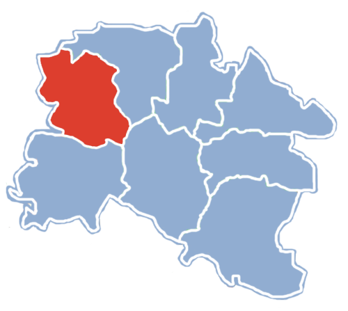 Położenie gminy Siemkowice na mapie powiatu pajęczańskiego.